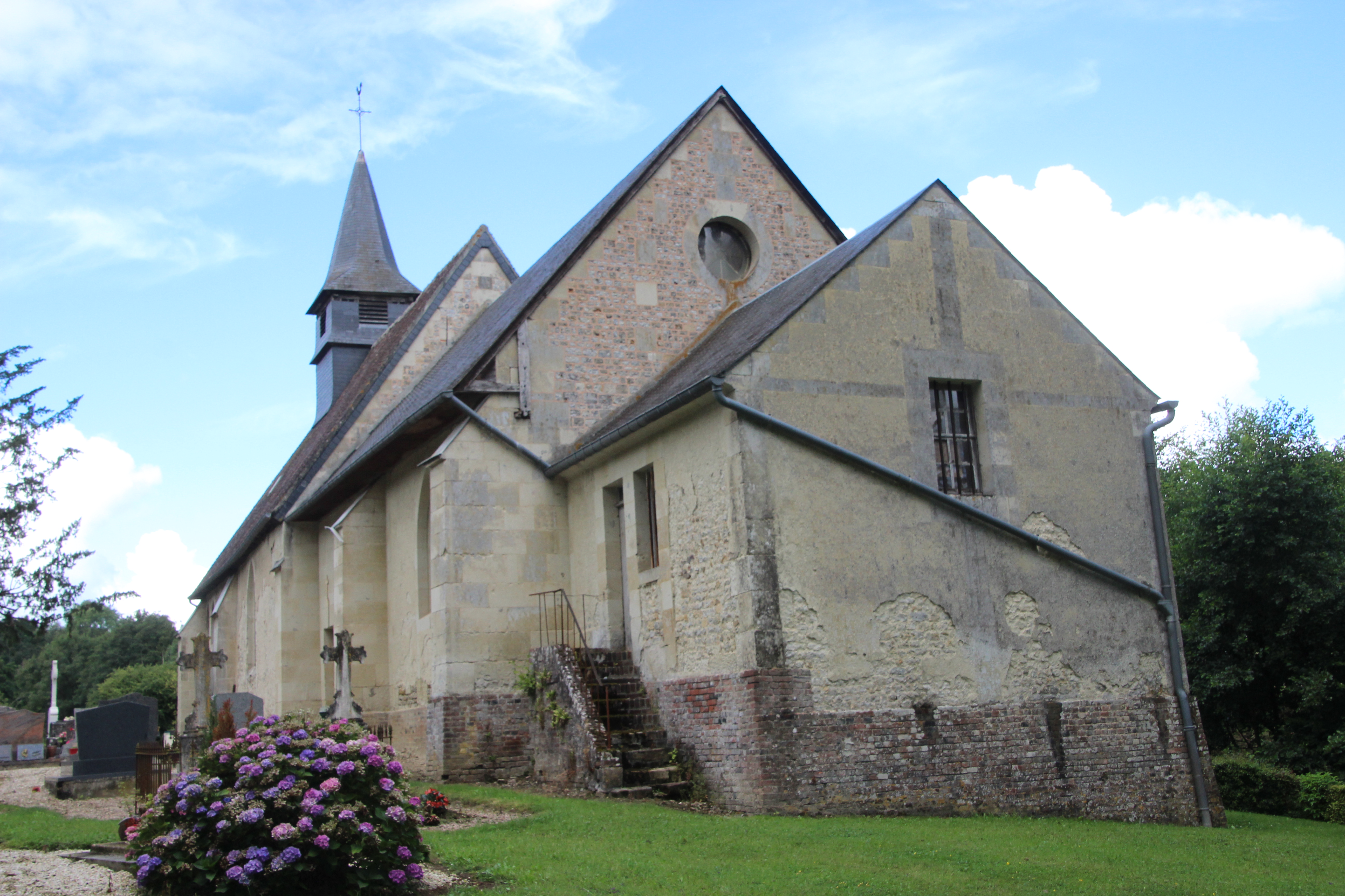 église Formentin